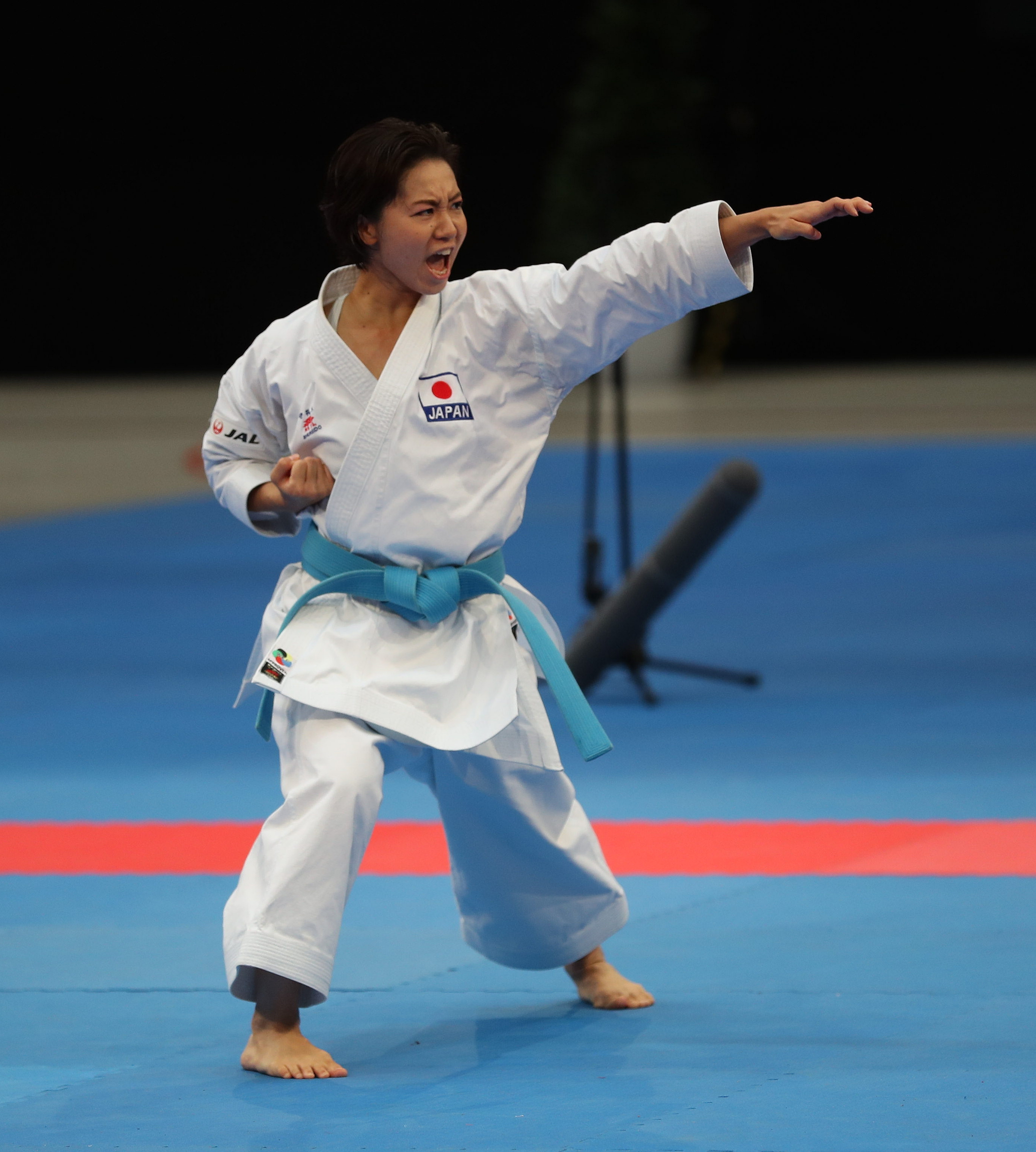 Female Kata am 16. September 2018 in der Karate1 Premier League Berlin 2018. Abgebildet: Emiri Iwamoto.